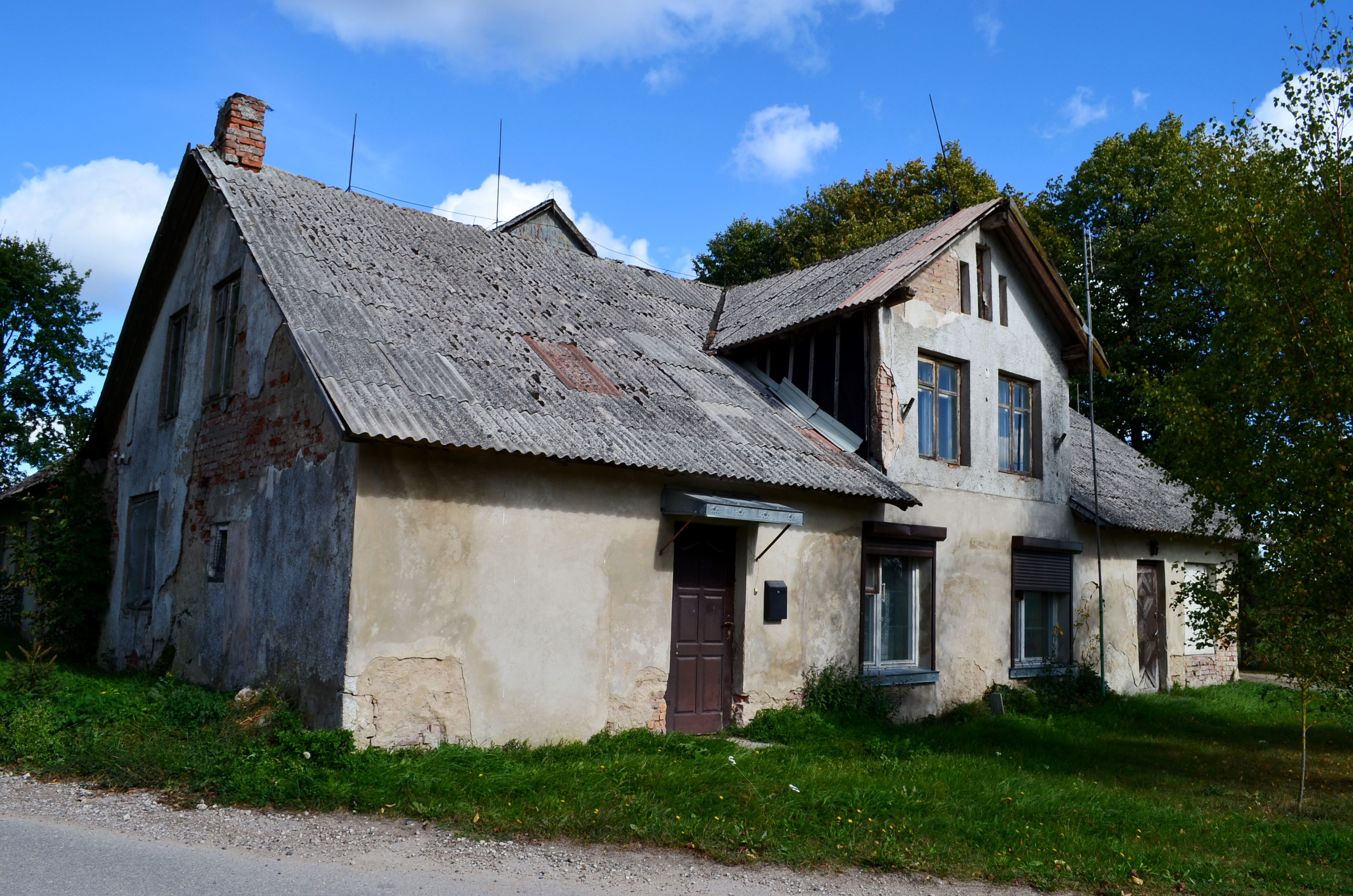 Žemaitėška: Juonātē, Šėlotės rajuons